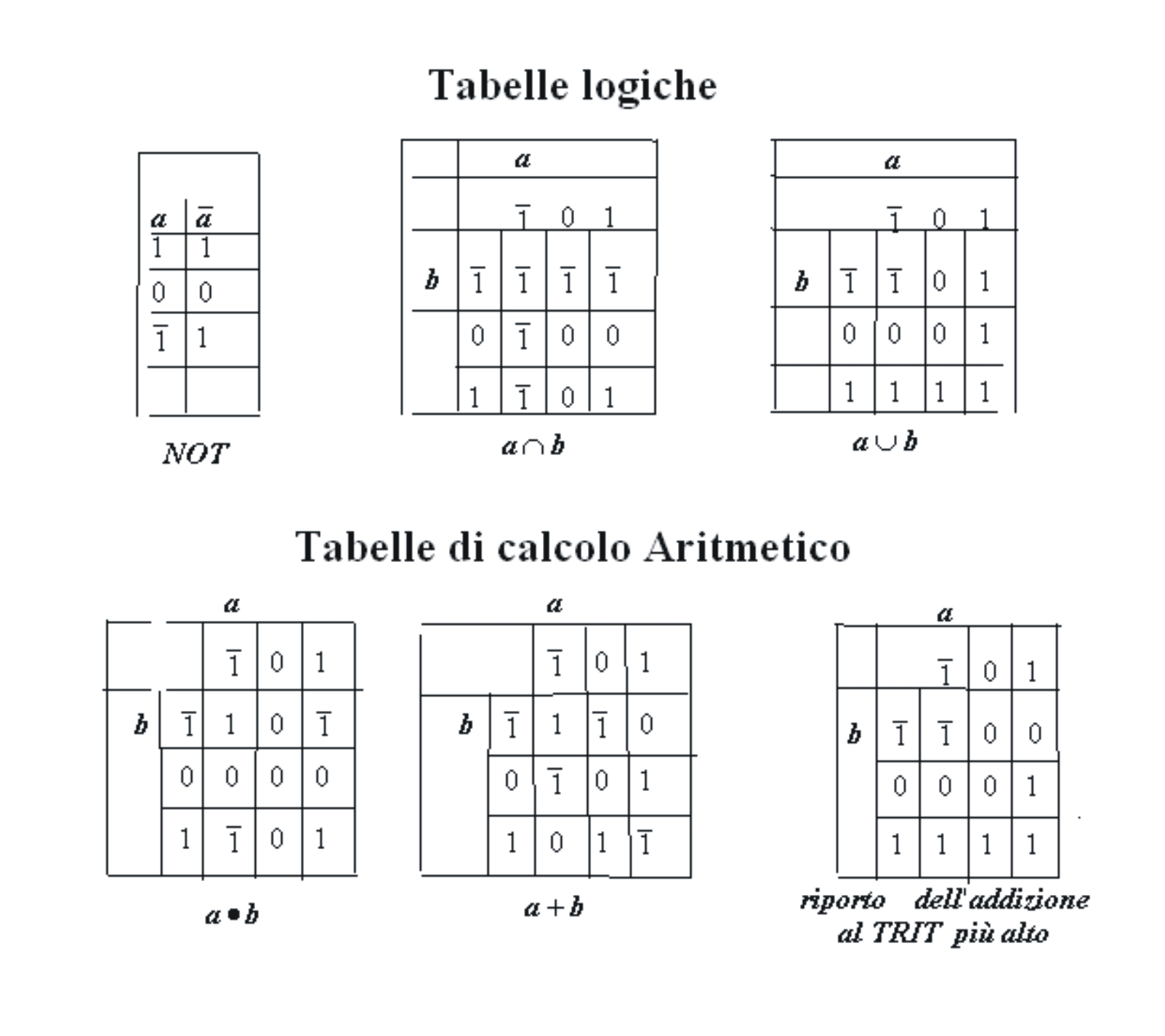 Tabelle logiche